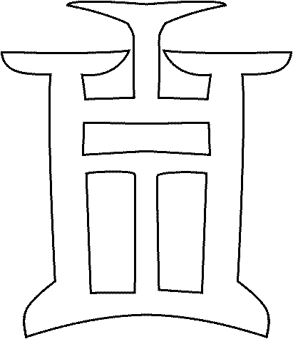 Il castello delle monete di Genova